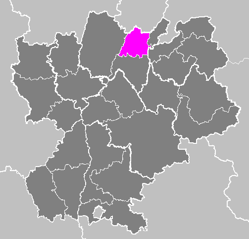 Maps of arrondissements and cantons of France: Arrondissement de Nantua.PNG (Région Rhône-Alpes)